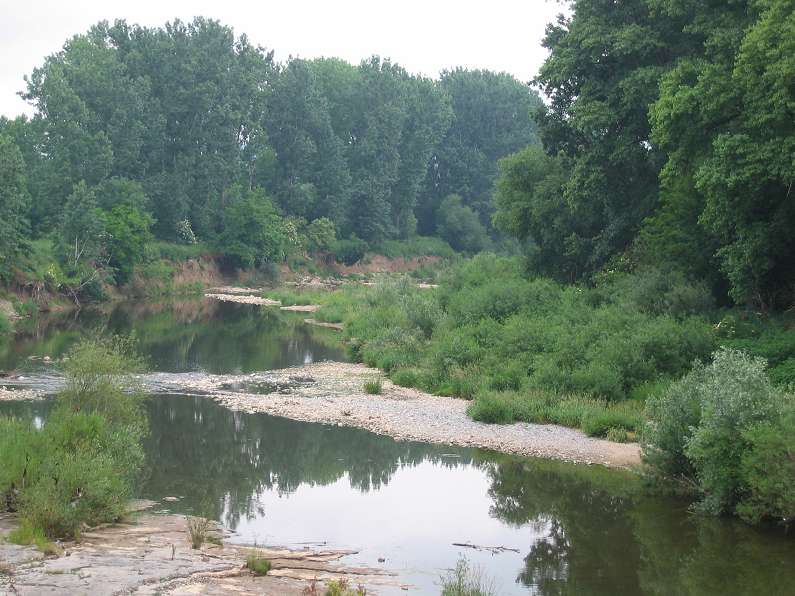 Naturschutzgebiet Altneckar, bei Freiberg am Neckar